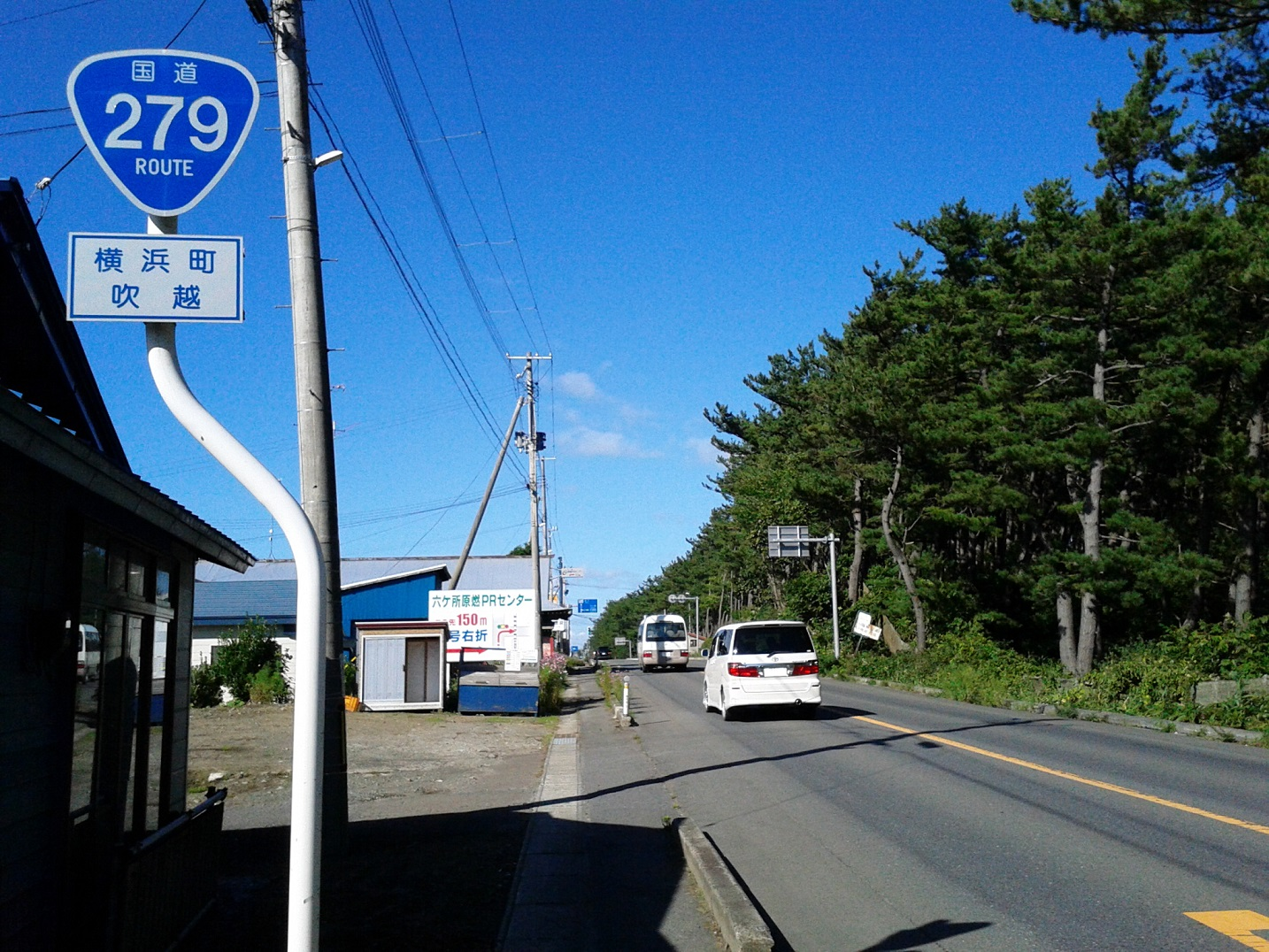 上北郡横浜町吹越付近の国道279号。